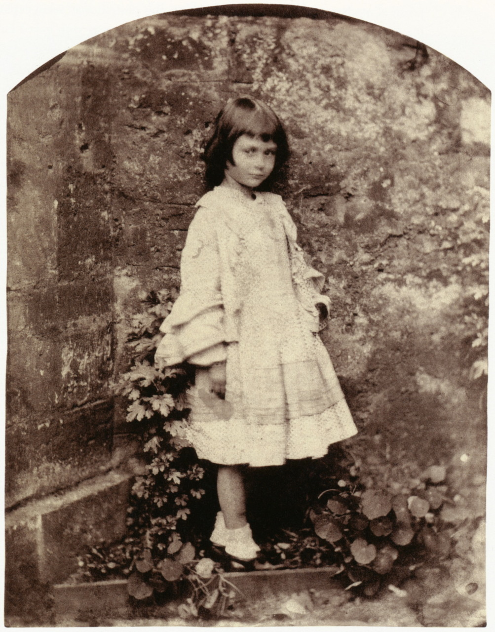 Lewis Carroll (British, Daresbury, Cheshire 1832–1898 Guildford). Dressed in Her Best Outfit, 1858